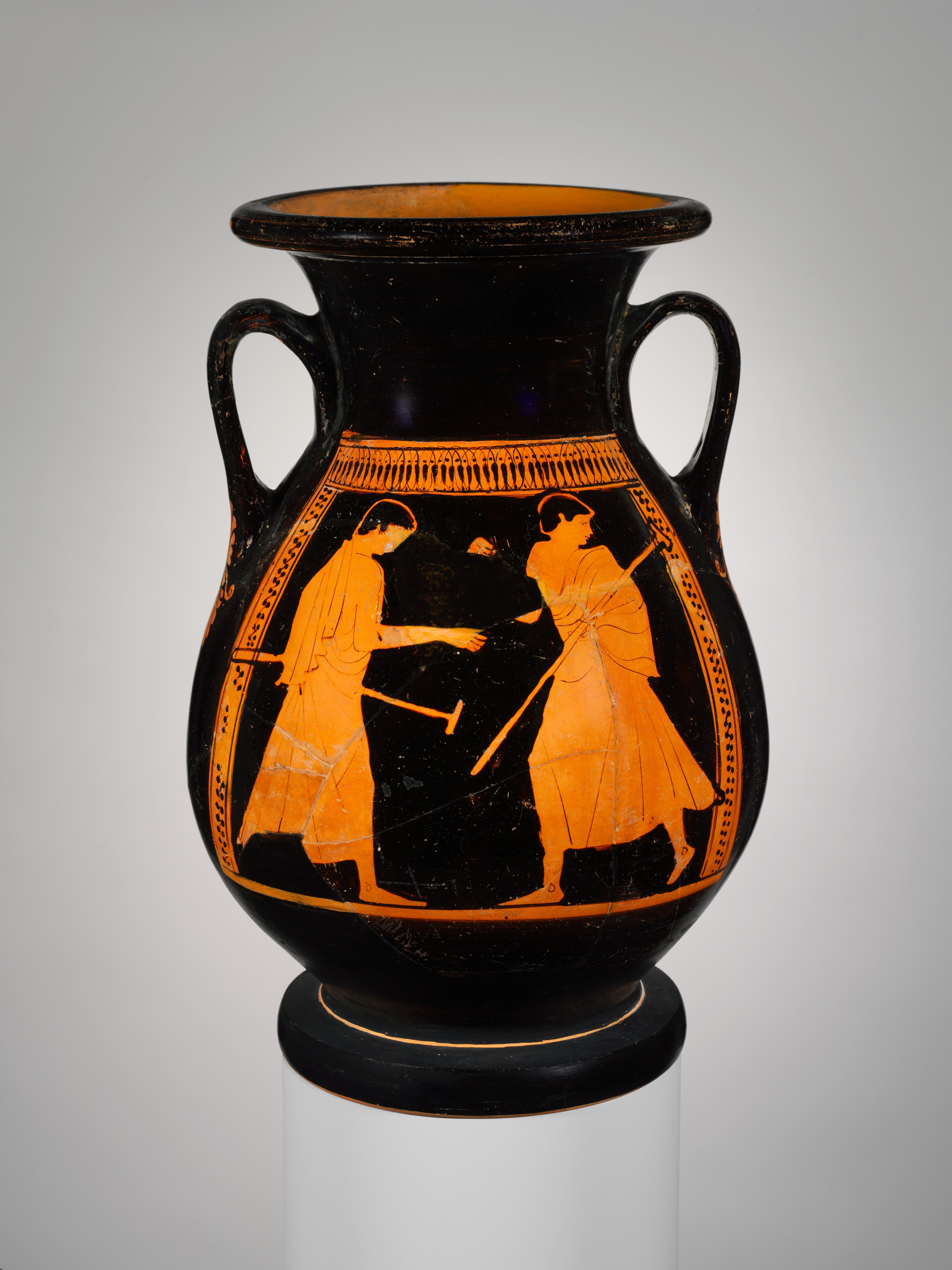 Greek, Attic; Pelike; Vases